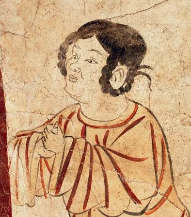 中文（香港）: 安陽唐代趙逸公墓中出土壁畫的叉手禮